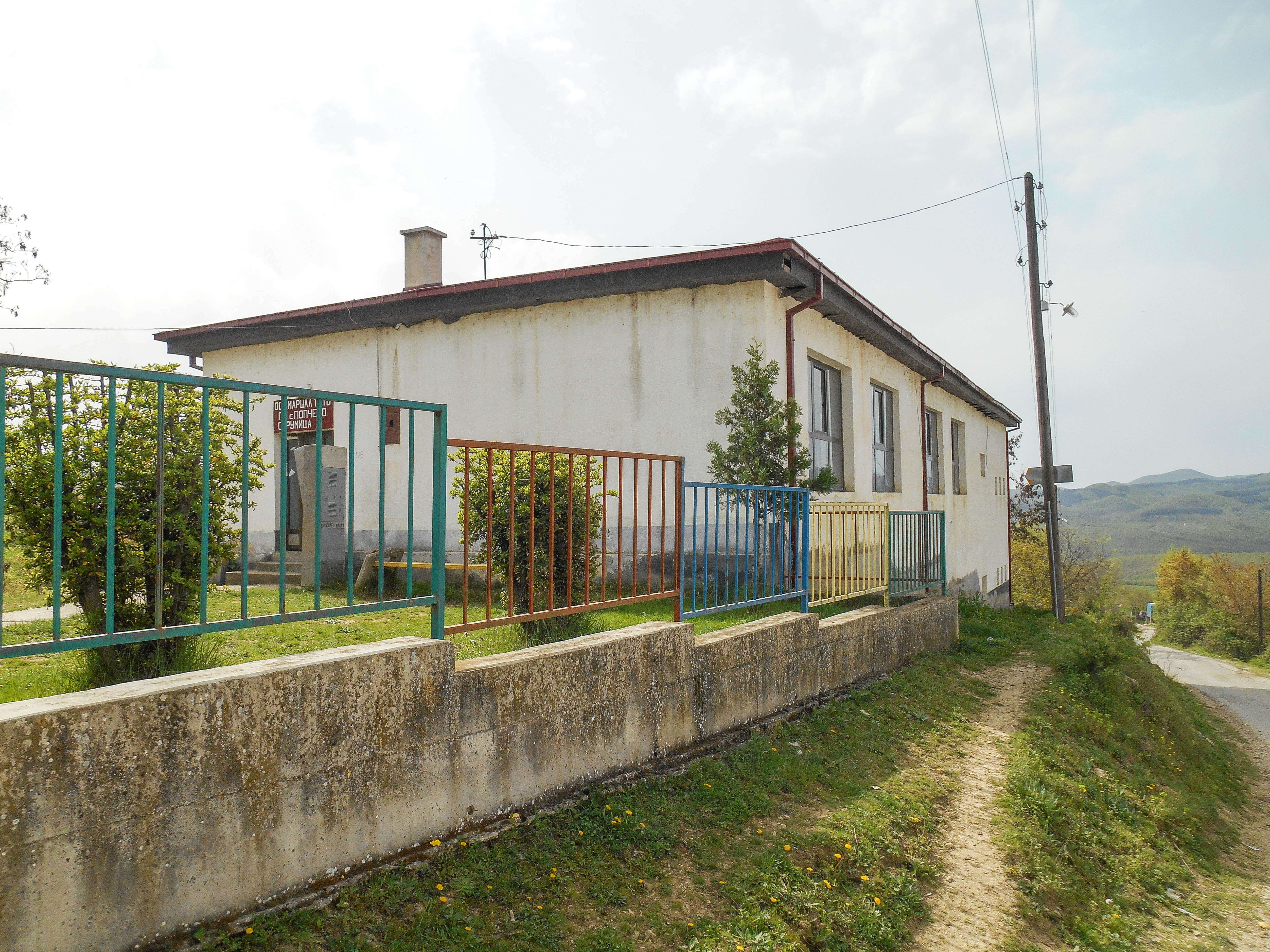 Училиште Маршал Тито